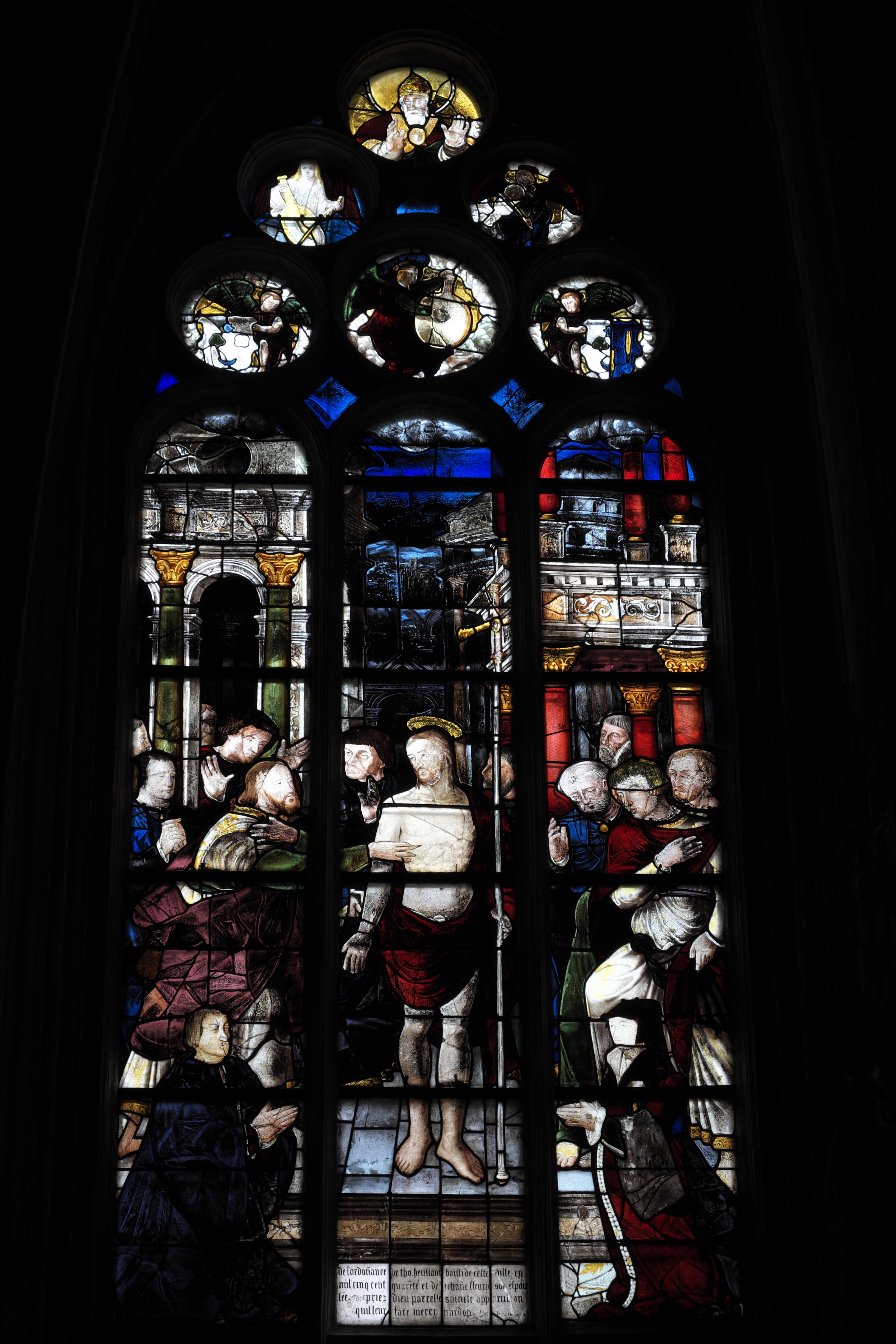 Katholische Pfarrkirche Notre-Dame-des-Marais in La Ferté-Bernard im Département Sarthe (Pays de la Loire/Frankreich), Bleiglasfenster (baie 8), um 1540; Darstellung: Ungläubiger Thomas